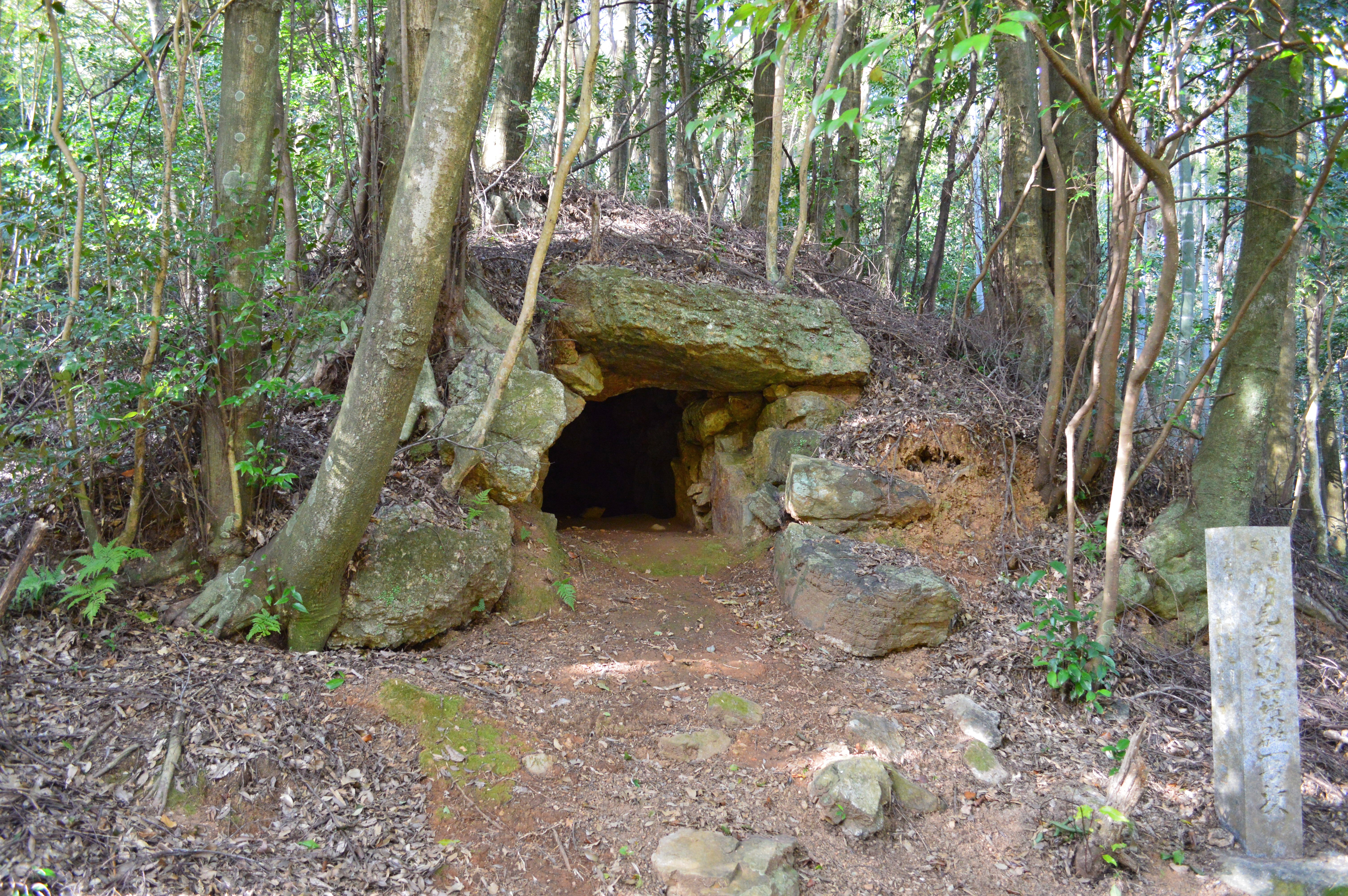 明見彦山1号墳 概観